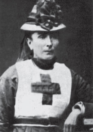 Ignacia Zeballos Taborga (1831 - 1904)Heroina boliviana de la Guerra del Pacífico